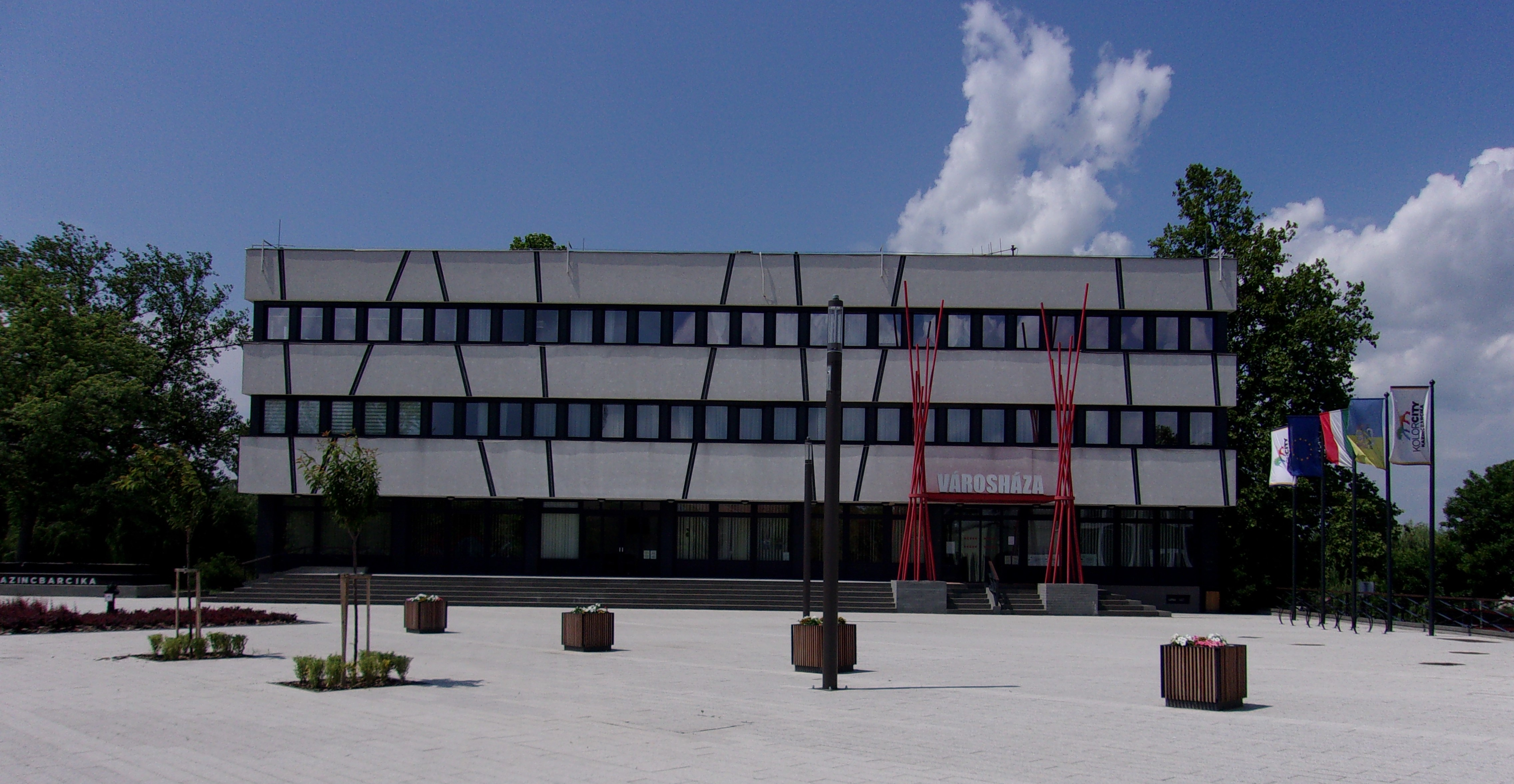 A Polgármesteri Hivatal épülete Kazincbarcikán